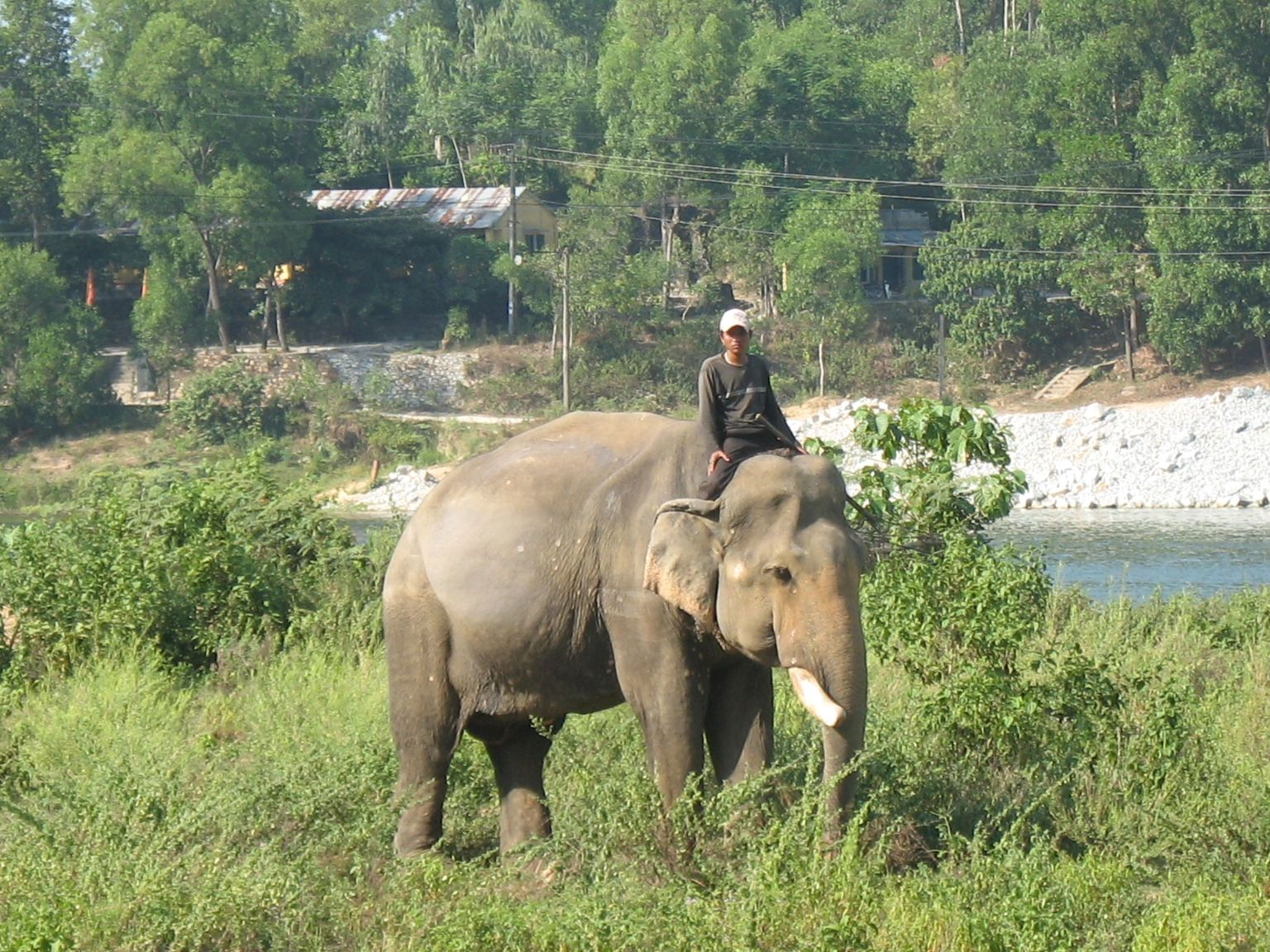 Arbeitselefant in der Nähe des Parfümflusses bei Huế